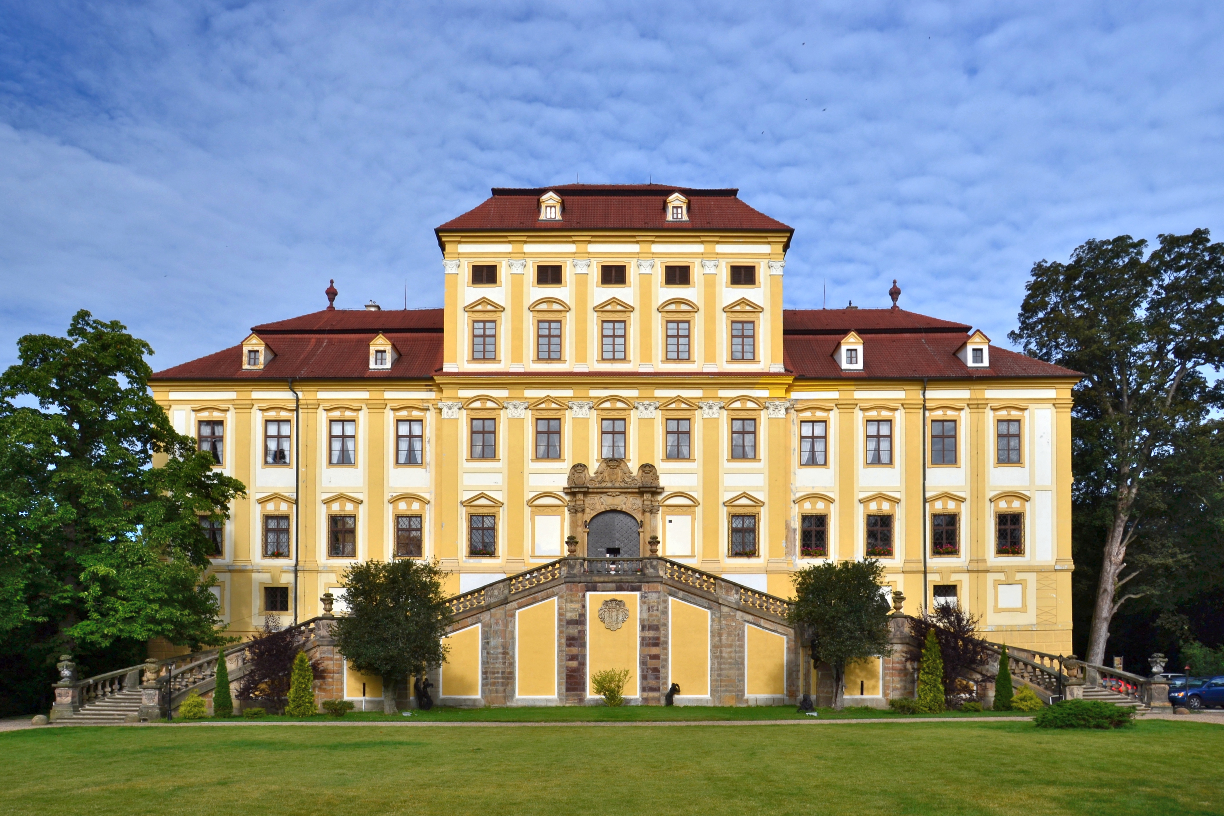 Zámek Červený Hrádek, na okraji vsi, severně od centra 1, Červený Hrádek